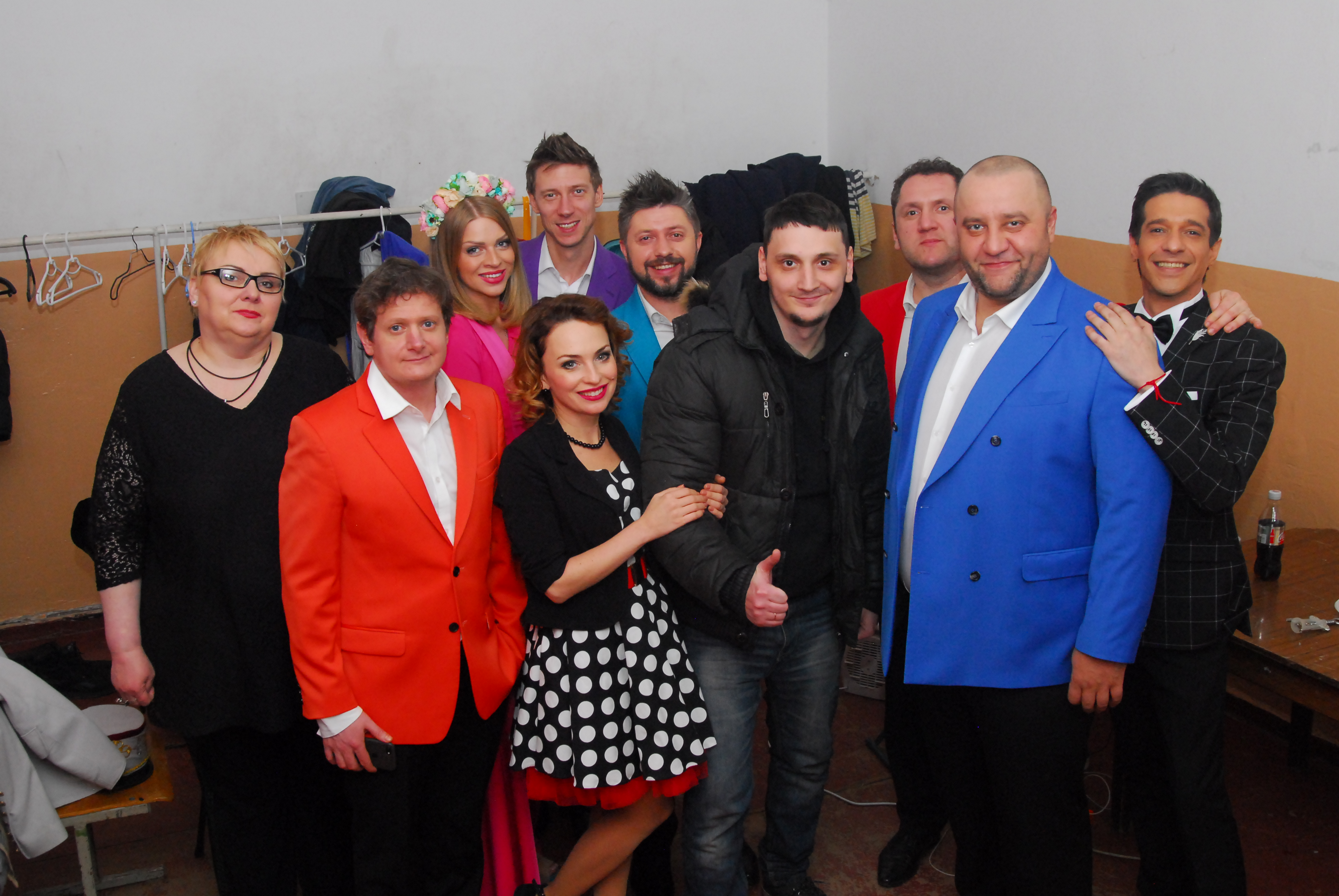 В Мелитополе